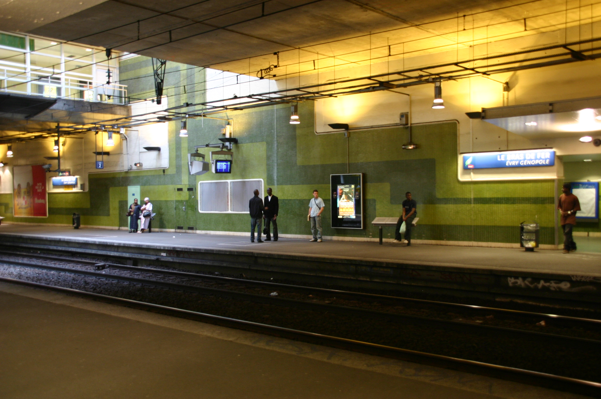 Gare du Bras de Fer-Évry-Génopole, Evry, département de l'Essonne, France